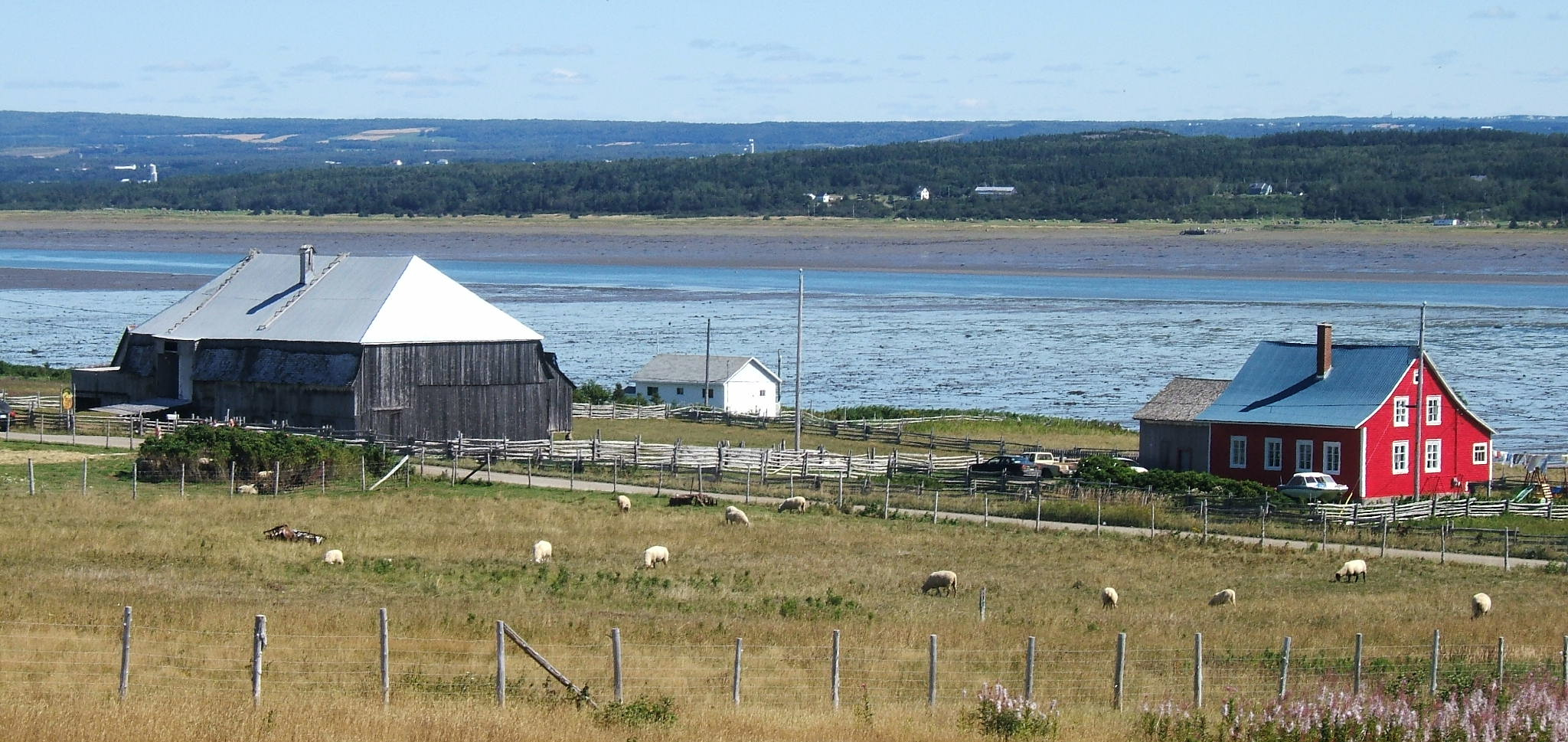 Aperçu de la municipalité de Notre-Dame-des-Sept-Douleurs. Élevage de moutons.